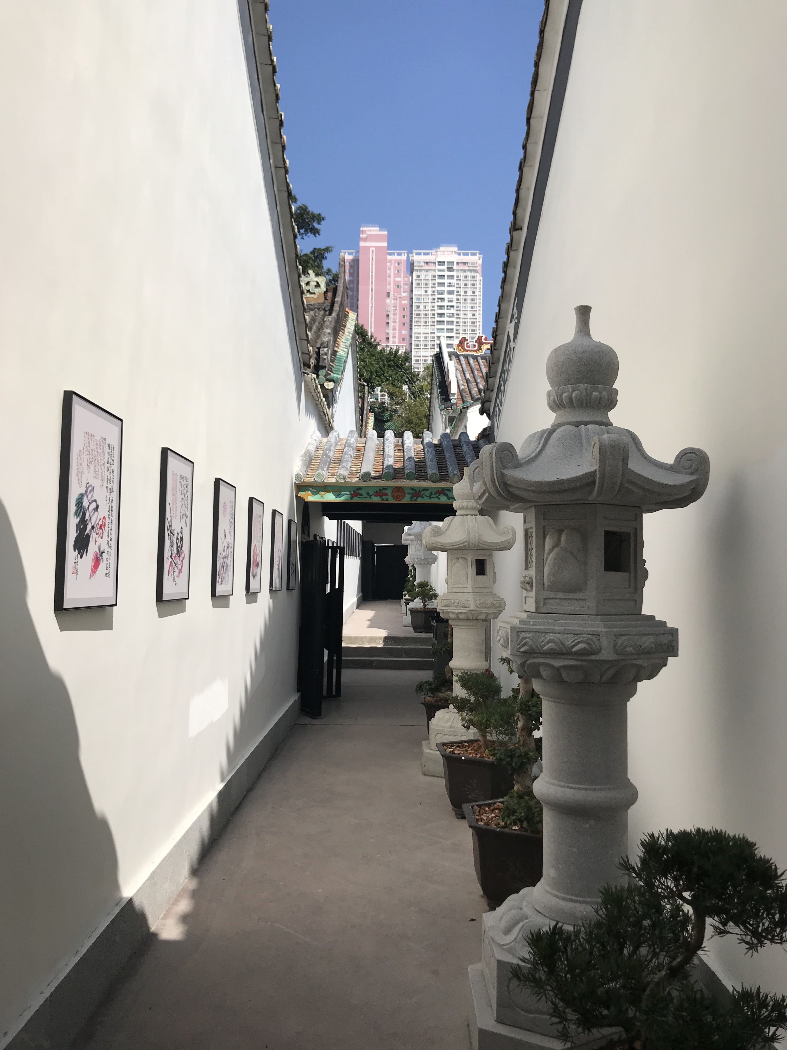 受非法工程破壞的普濟禪院，青磚牆被髹以白色油漆，並被掛上現代畫作